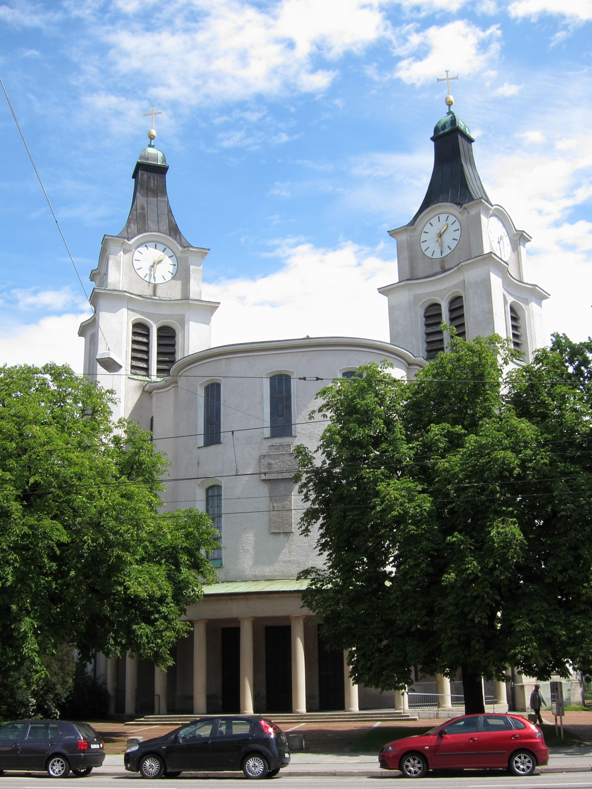 Kath. Pfarrkirche Christkönig, Nymphenburg, Notburgastraße. 1928 - 30 nach dem Entwurf von Oberbaurat August Blößner erbaut, am 25. Feb. 1945 durch Bomben zerstört, 1947 - 50 unter Leitung von Sep Ruf wieder aufgebaut.